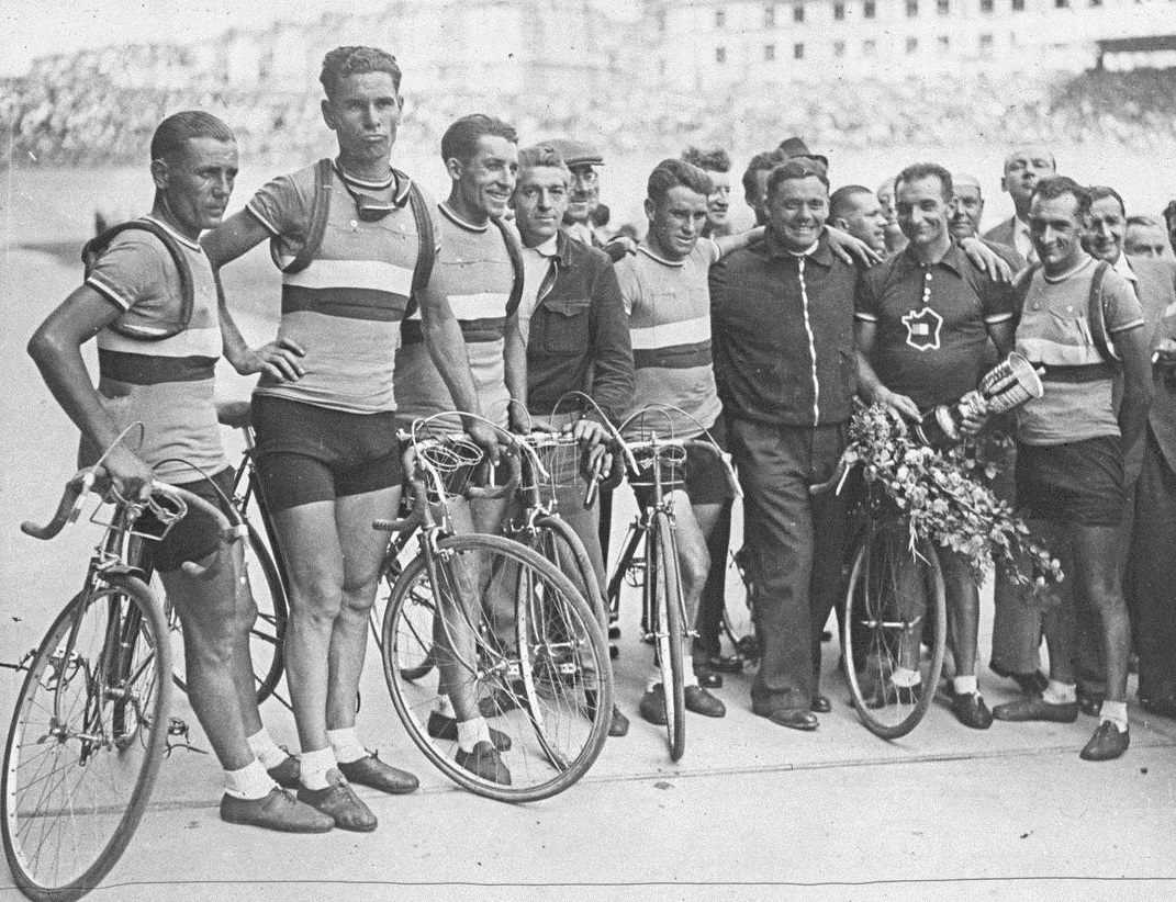 Tour de France 1937, 20e étape Caen-Paris le 25 juillet. Parc des Princes, (de g. à dr.) Robert Tanneveau, Emile Gamard, Sylvain Marcaillou, Pierre Cloarec, Roger Lapebie, Paul Chocque (les 6 coureurs de l'équipe de France qui restent sur les 10 du départ)